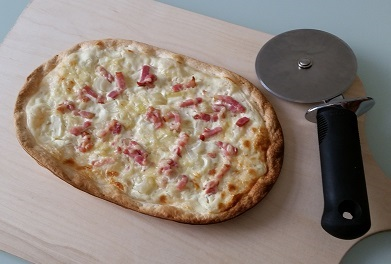 Flammkuchen traditionel: tynd, high grade hvedemel langtidsæltet med vand, salt og olie, uden gær eller andre hævemiddel. Rullet meget tynd ud, belagt med fromage blanc (ikke creme fraiche), røget bacon, snittet løg, og 3 minutter i øvn ved 280 grader Celsius